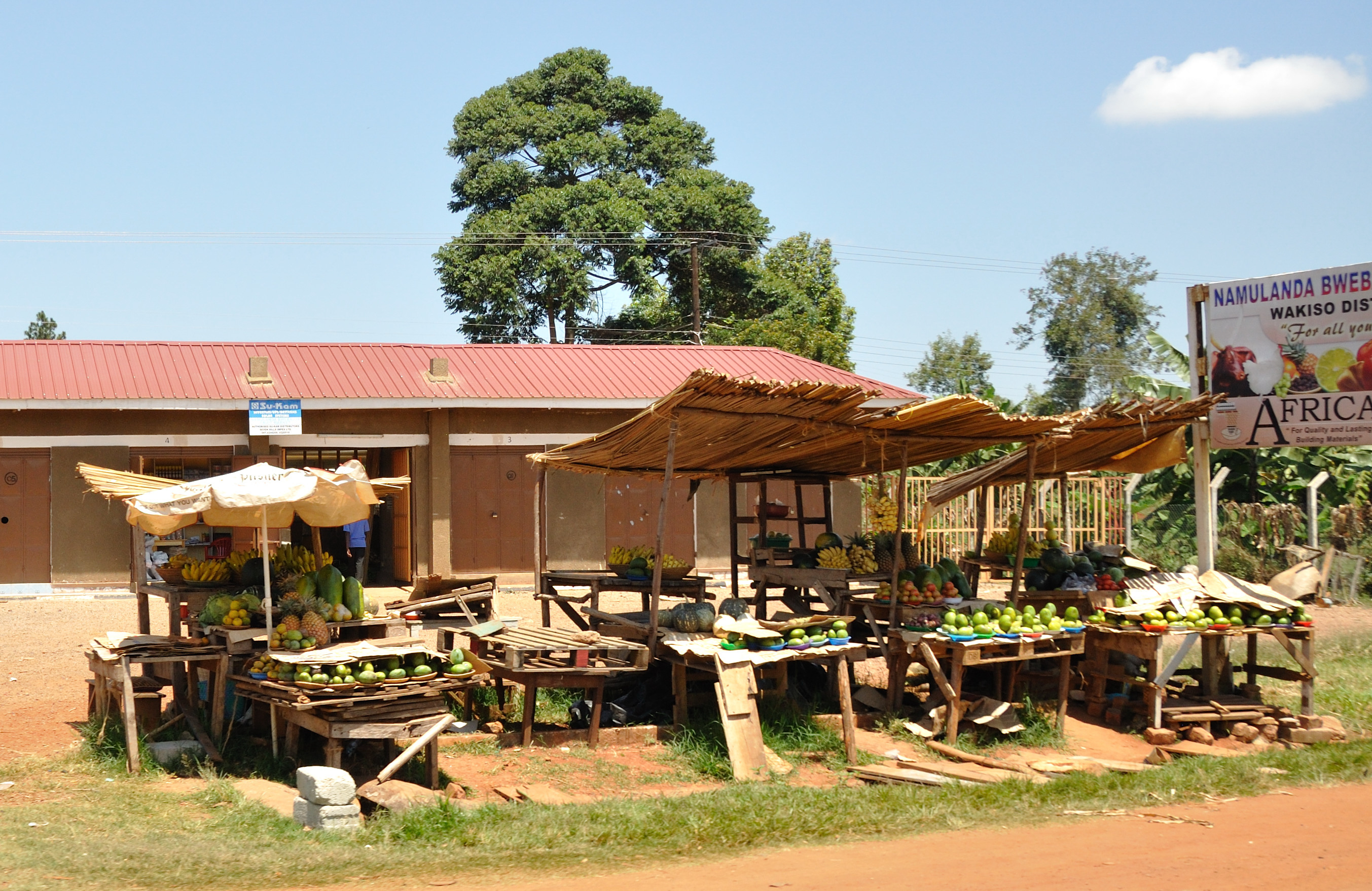 Uganda, Road side market between Kampala and Entebbe